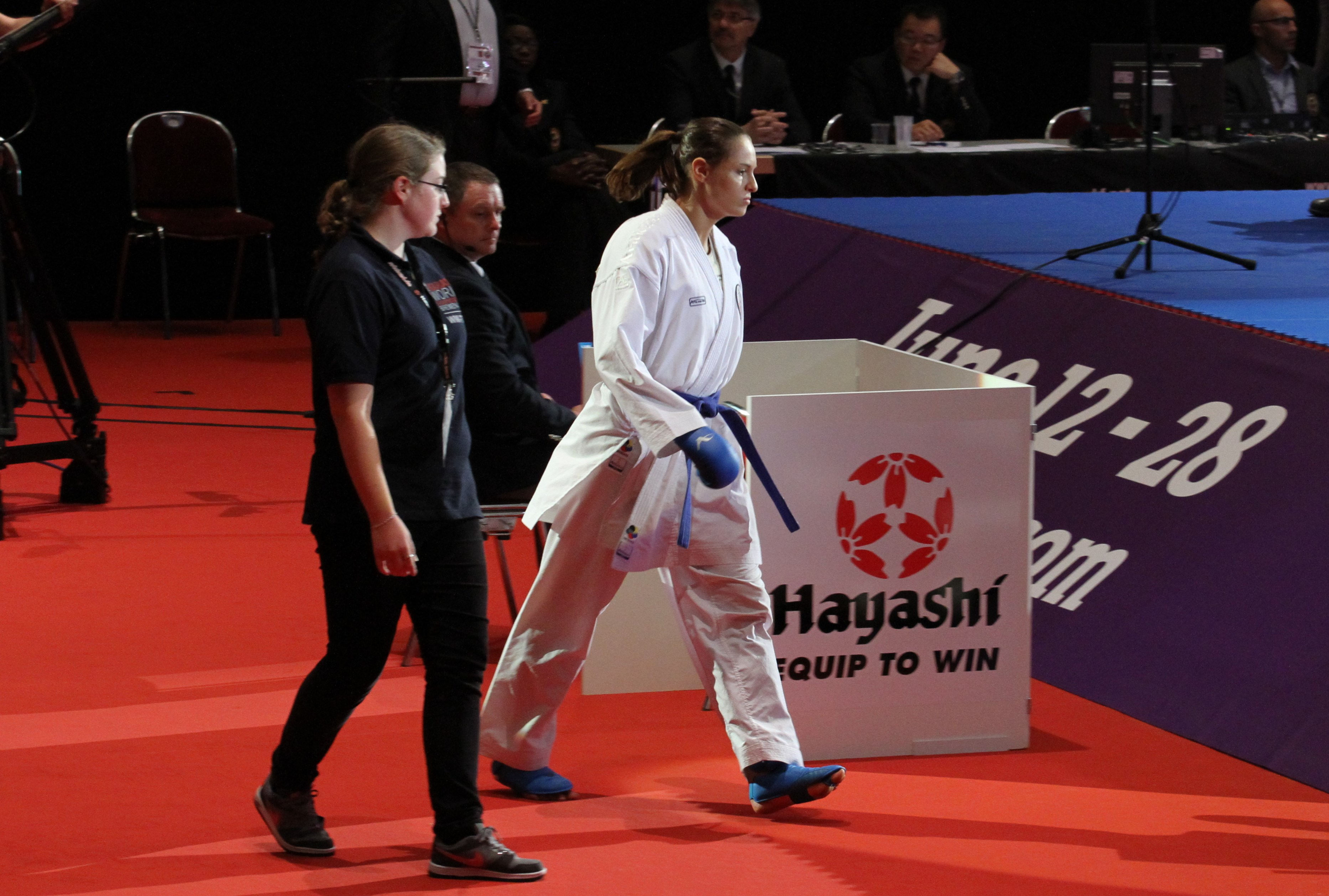 Alisa Buchinger Karateka, 3. Platz Karate WM 2014